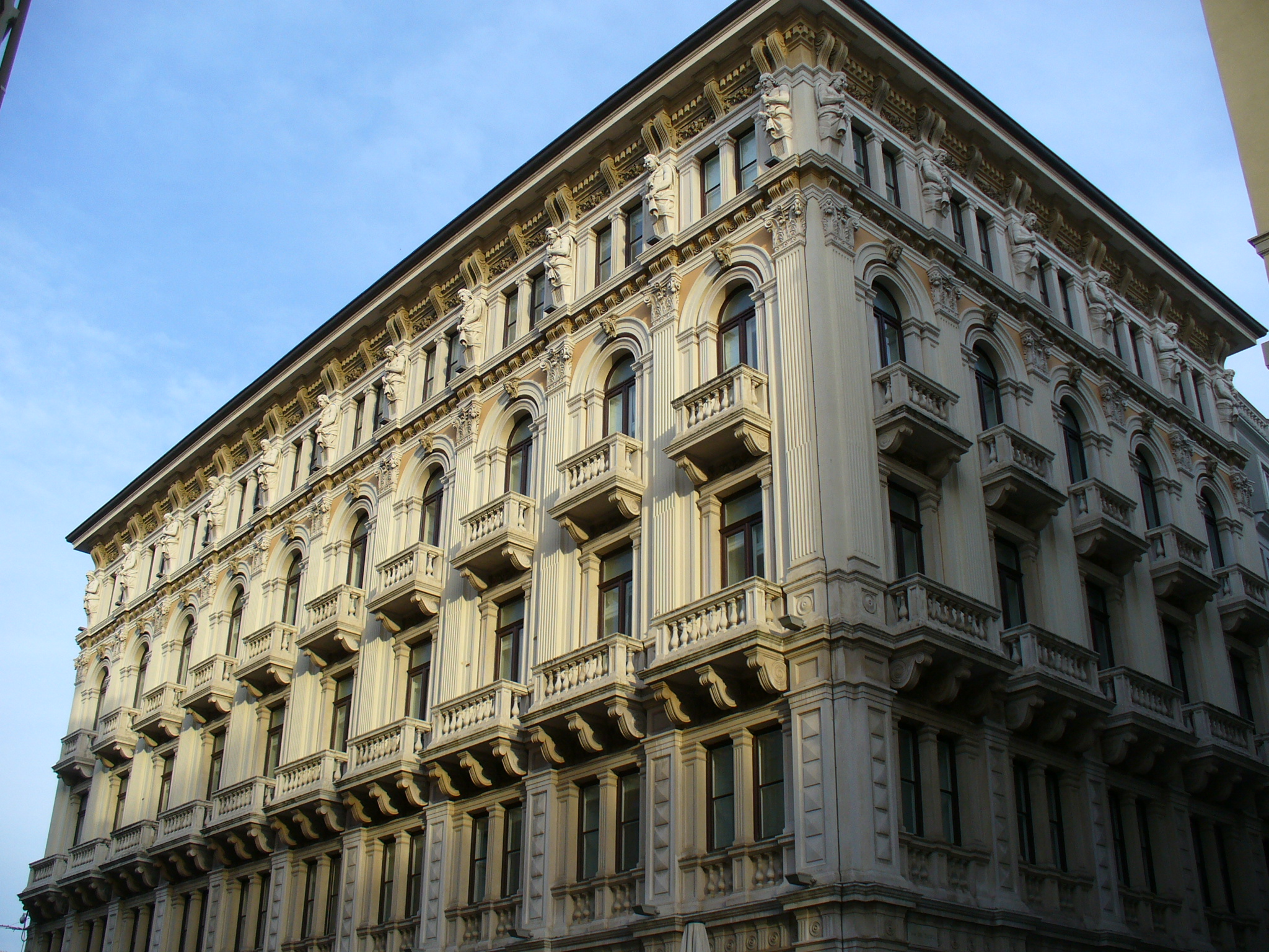 Palazzo an der Piazza dell'Unita d'Italia, 1871-1873, Giuseppe Bruni